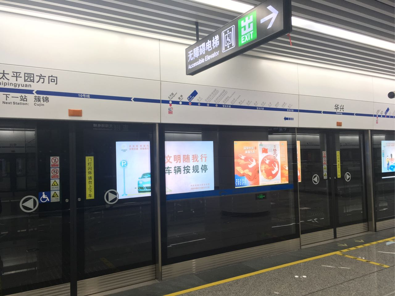 Huaxing Station of Chengdu Metro.jpg